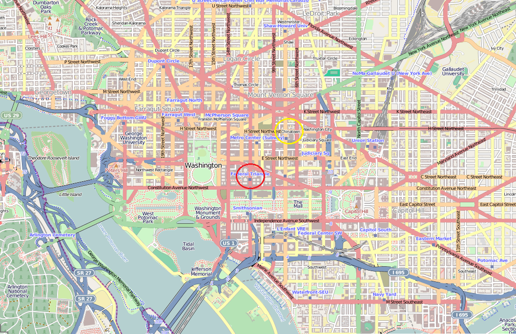 geografische kaart van Washington D.C. via [1] gele cirkel is de huidige Chinatown en de rode cirkel geeft de oude Chinatown aan